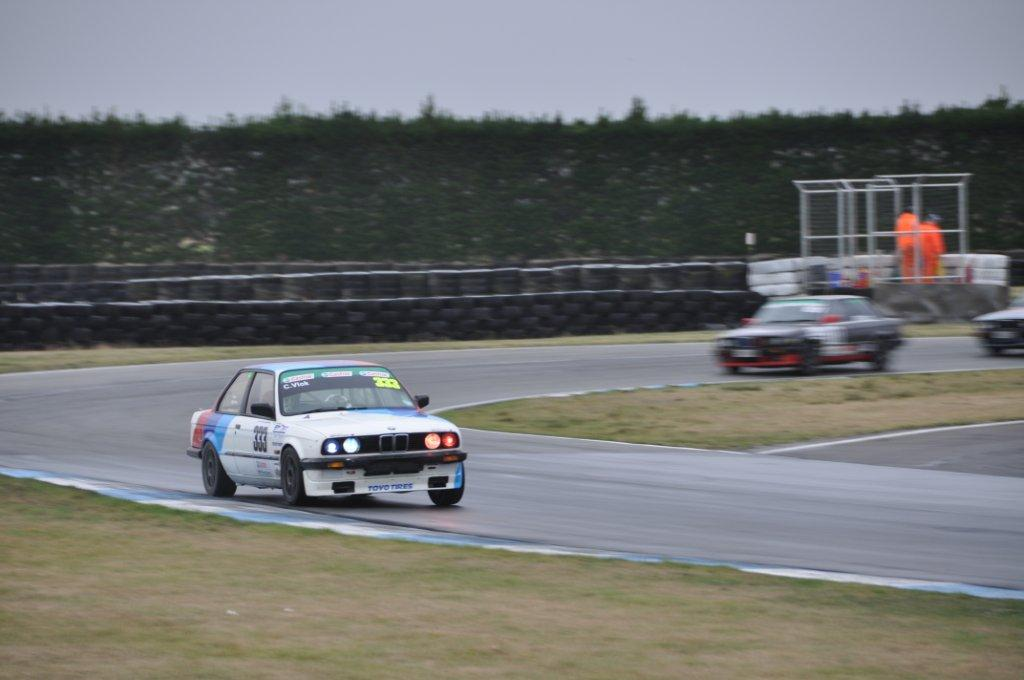 Français cadien: Chris Vlok Bmw Timaru